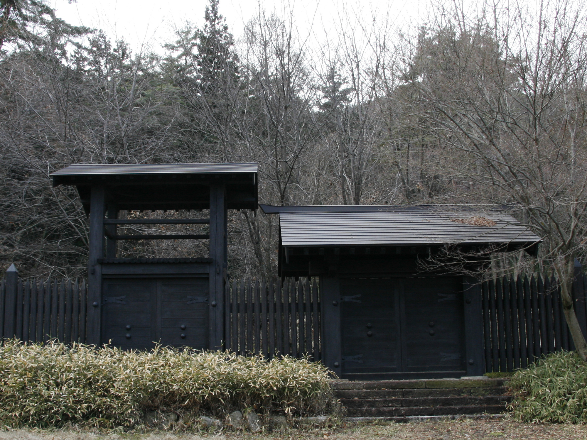 小岩嶽城の復元城門